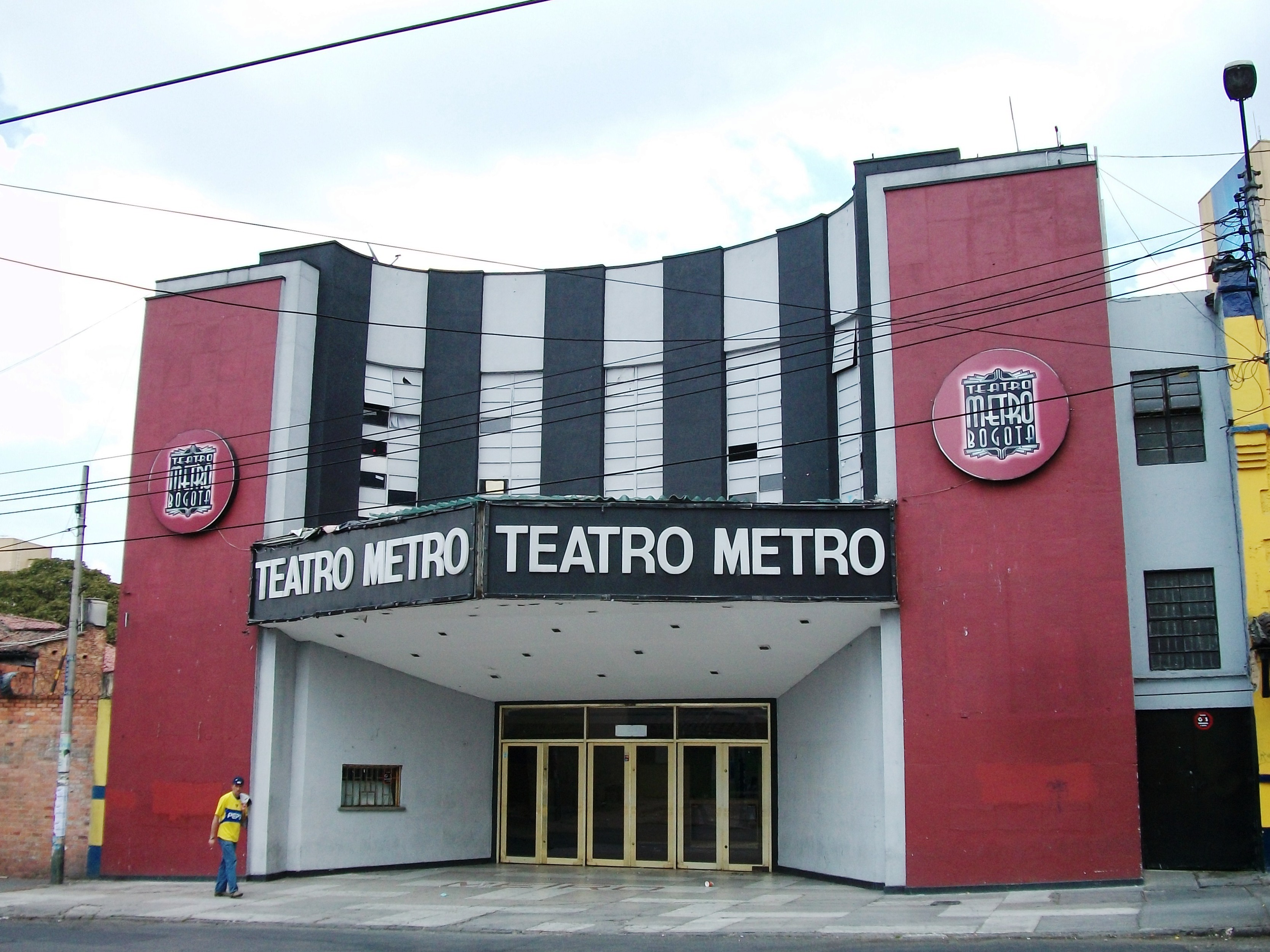 Teatro Metro de Bogotá, antiguo Teatro Teusaquillo, en la calle 34#13-28. Obra de Ricardo Ribas Seva.